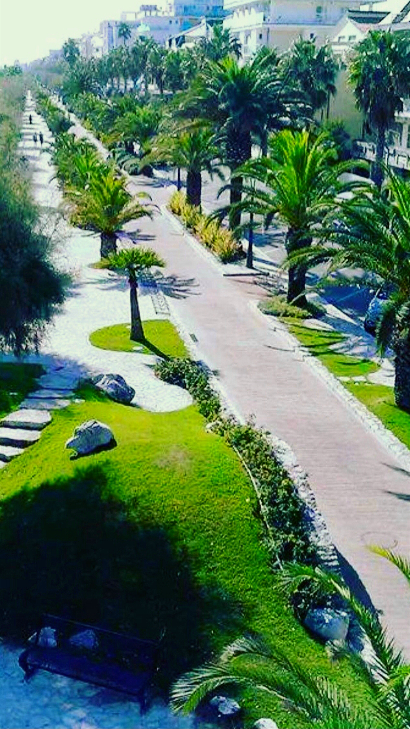 San Benedetto del Tronto, vista panoramica del tratto iniziale del lungomare sud.